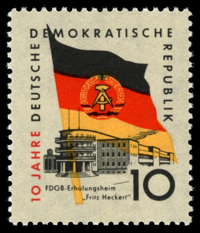 Information Information: Ausgabepreis: Pfennig First Day of Issue / Erstausgabetag: Auflage: Entwurf: Druckverfahren: Michel-Katalog-Nr: Ländercode-MiNr